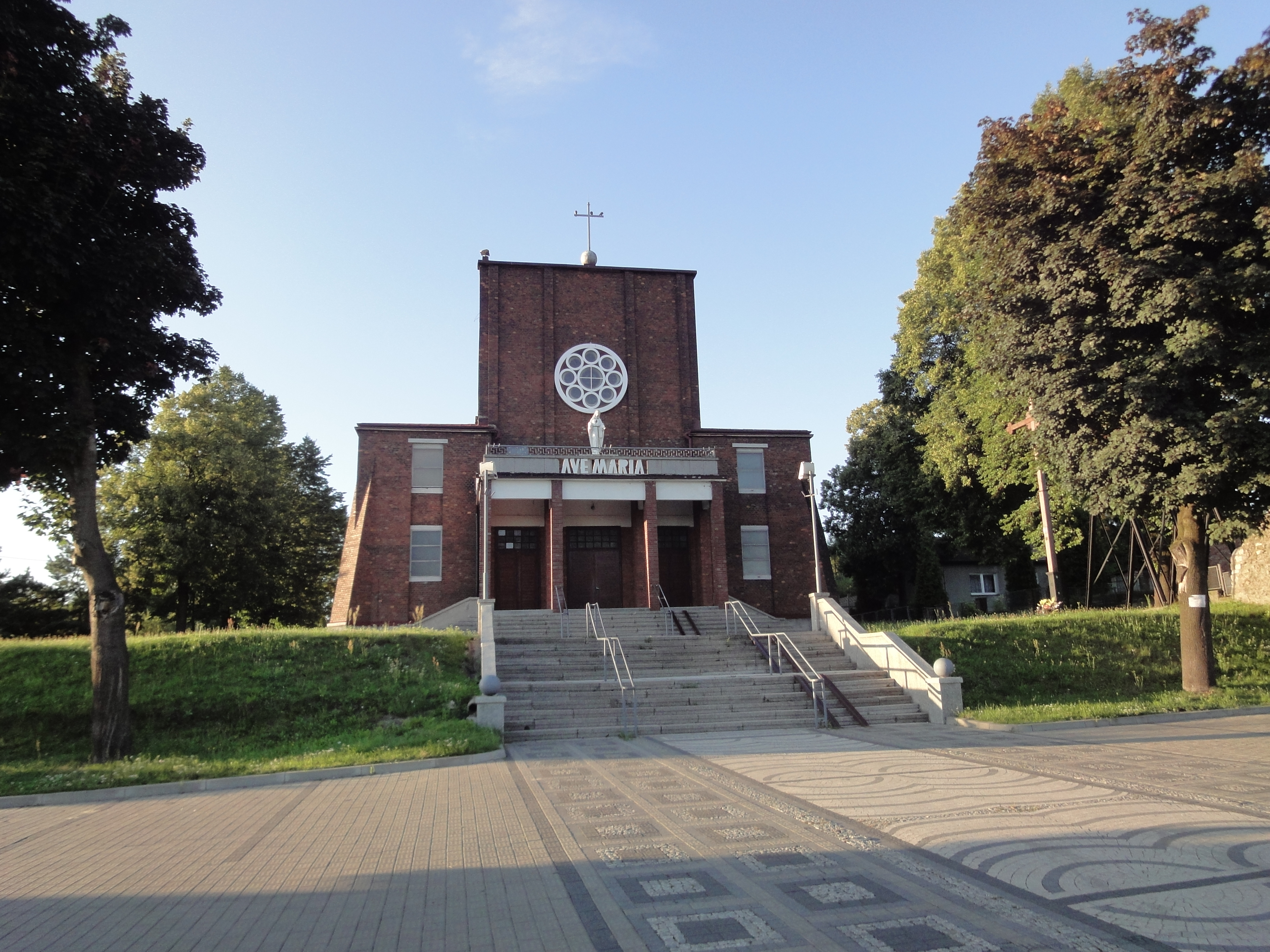 Kościół Wniebowzięcia Najświętszej Maryi Panny w Wojkowicach- Żychcicach widziany od ulicy Sobieskiego